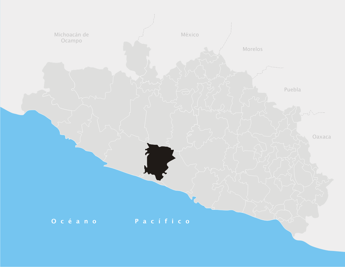 Localización de Atoyac de Álvarez, en el Estado de Guerrero (México)